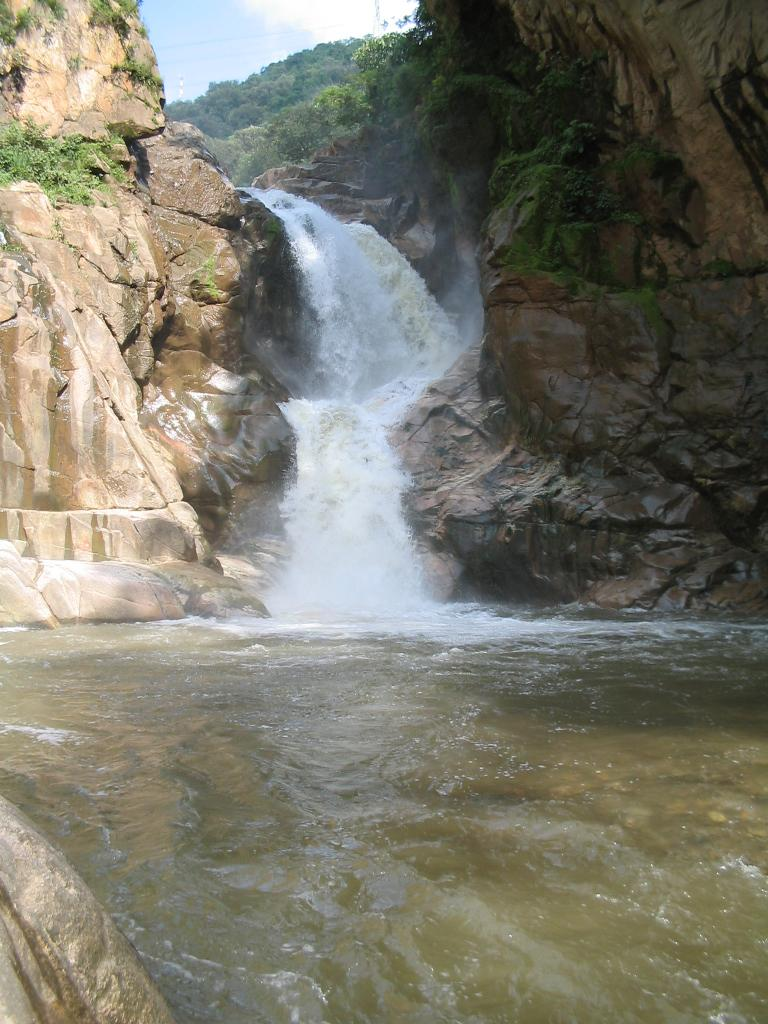 Hermosa la cascada principal de el Rio "El Salto"